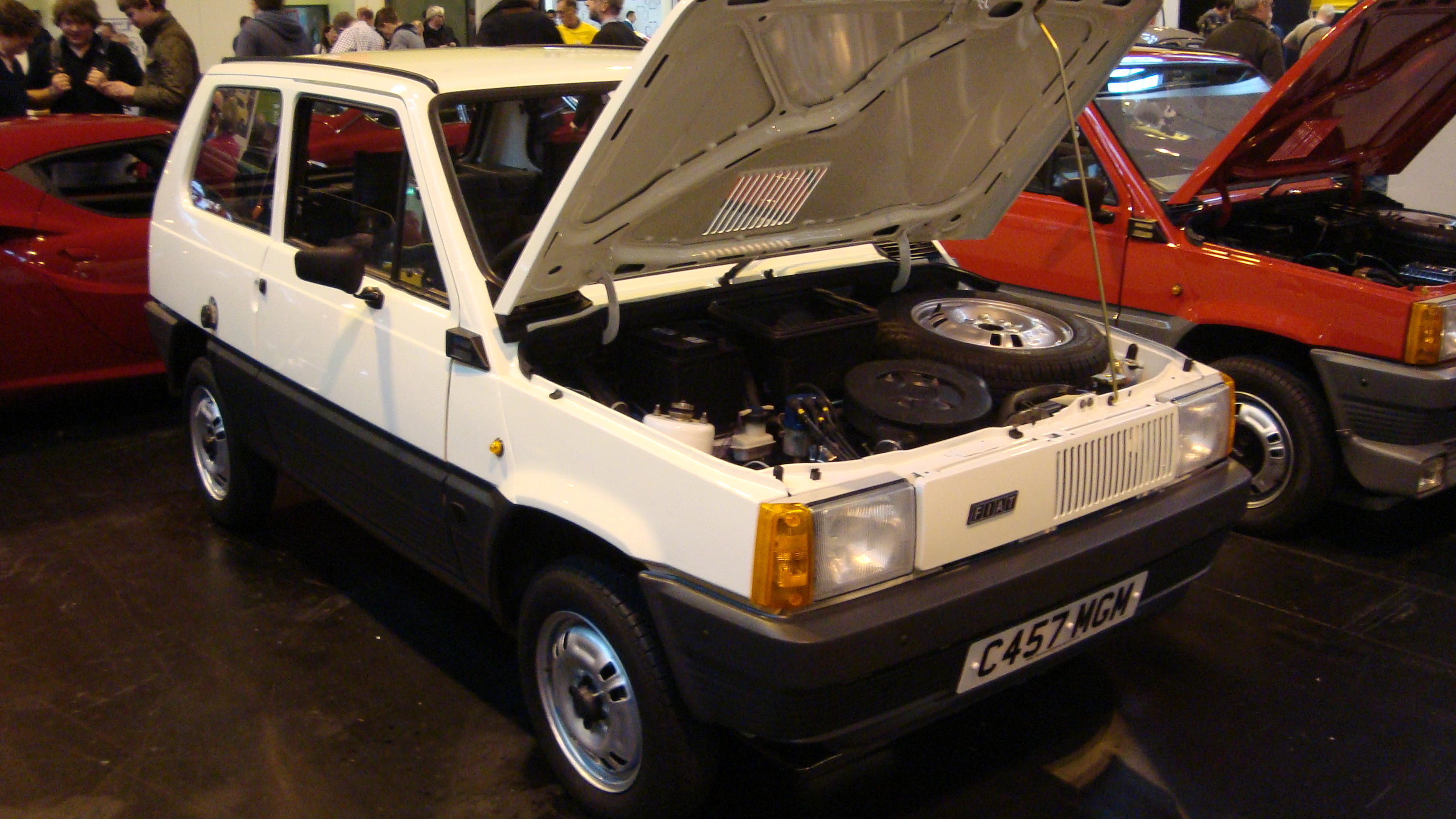 1985 Fiat Panda 900C